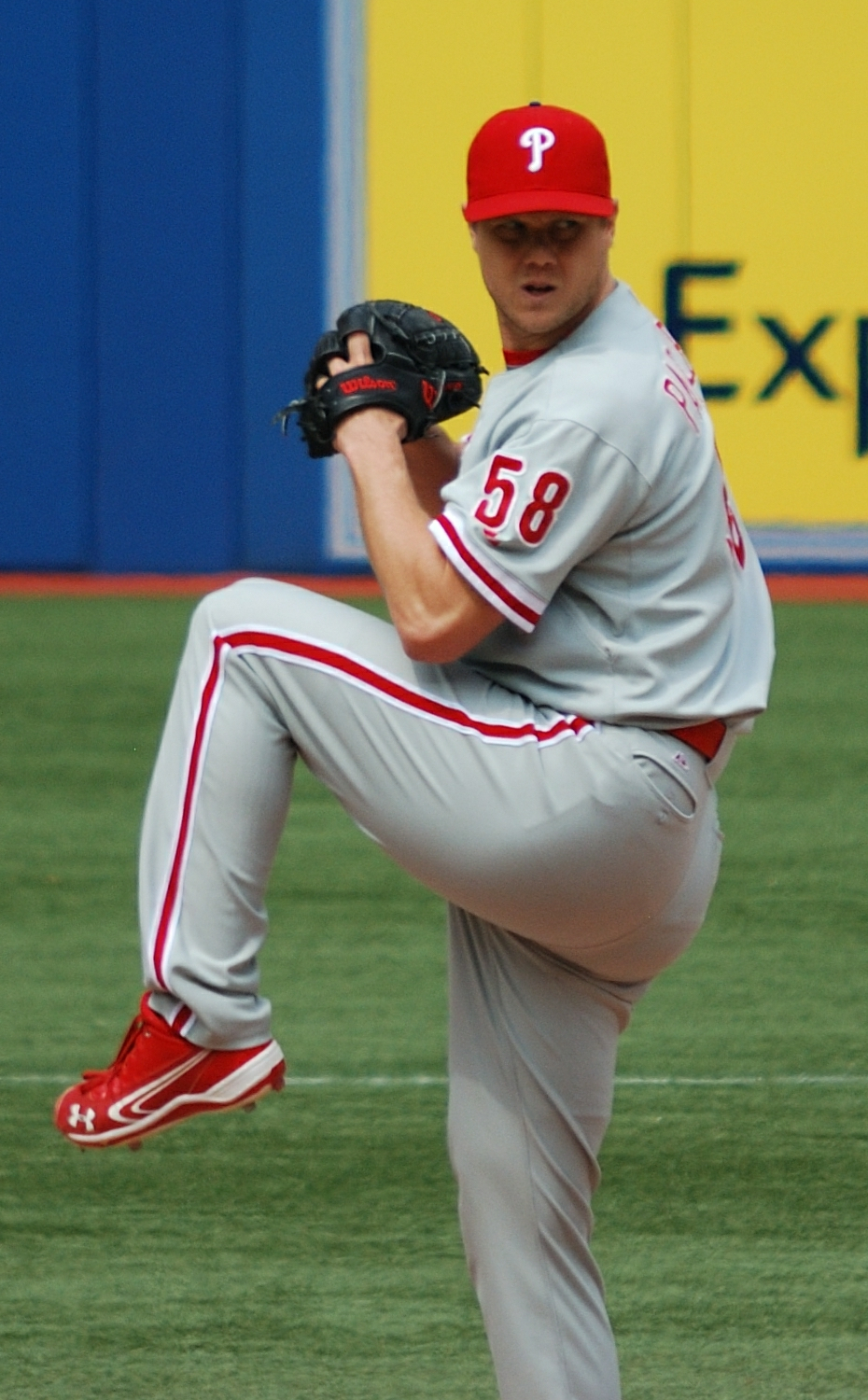 Jonathan Papelbon